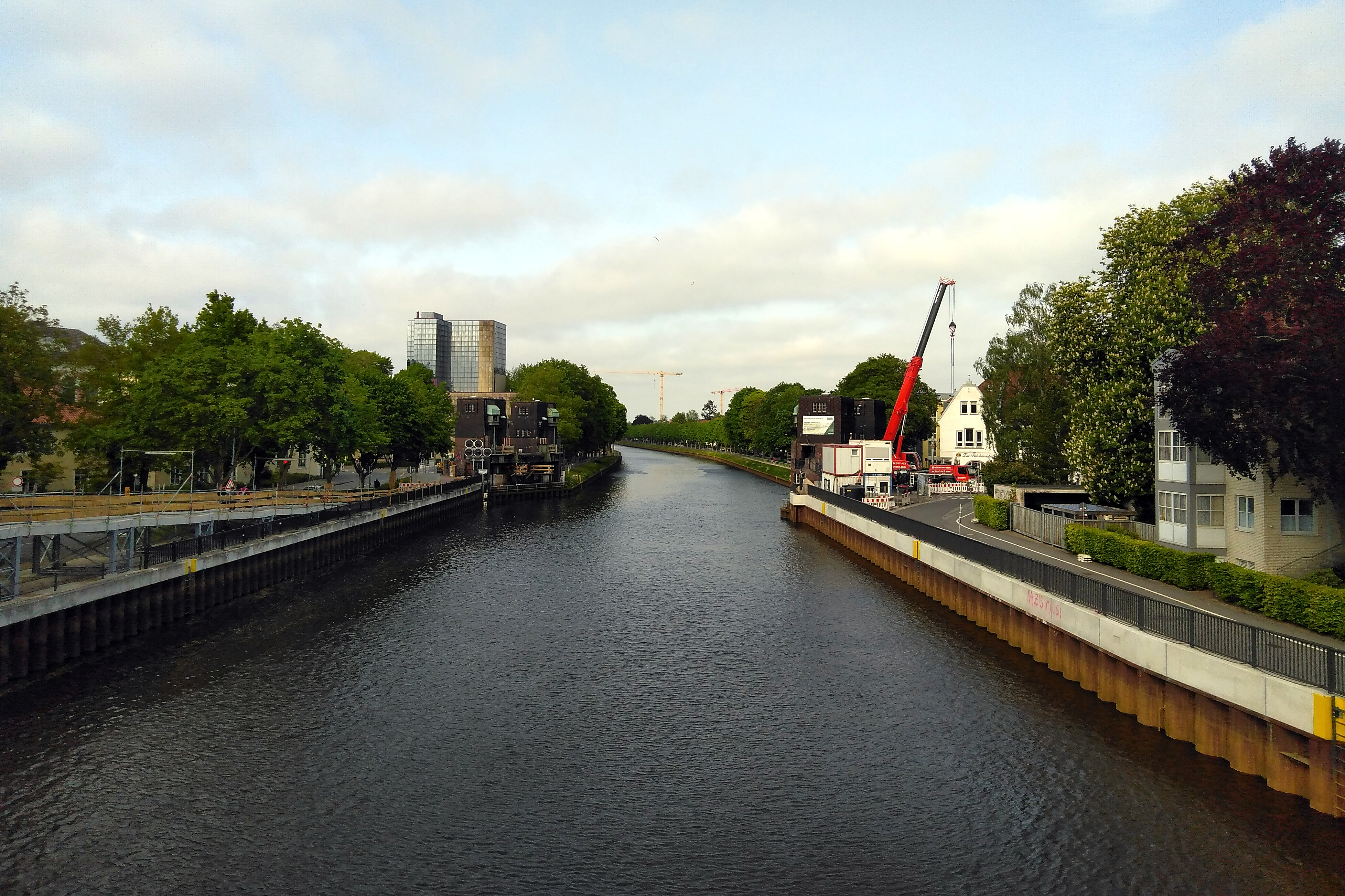 Entfernte Cäcilienbrücke in Oldenburg (Oldb) mit Blick von der Behelfsbrücke.